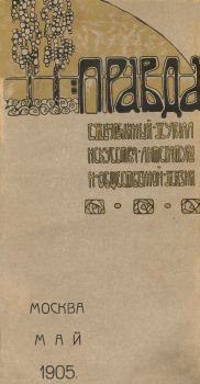 Ежемесячный журнал искусства, литературы, общественной жизни